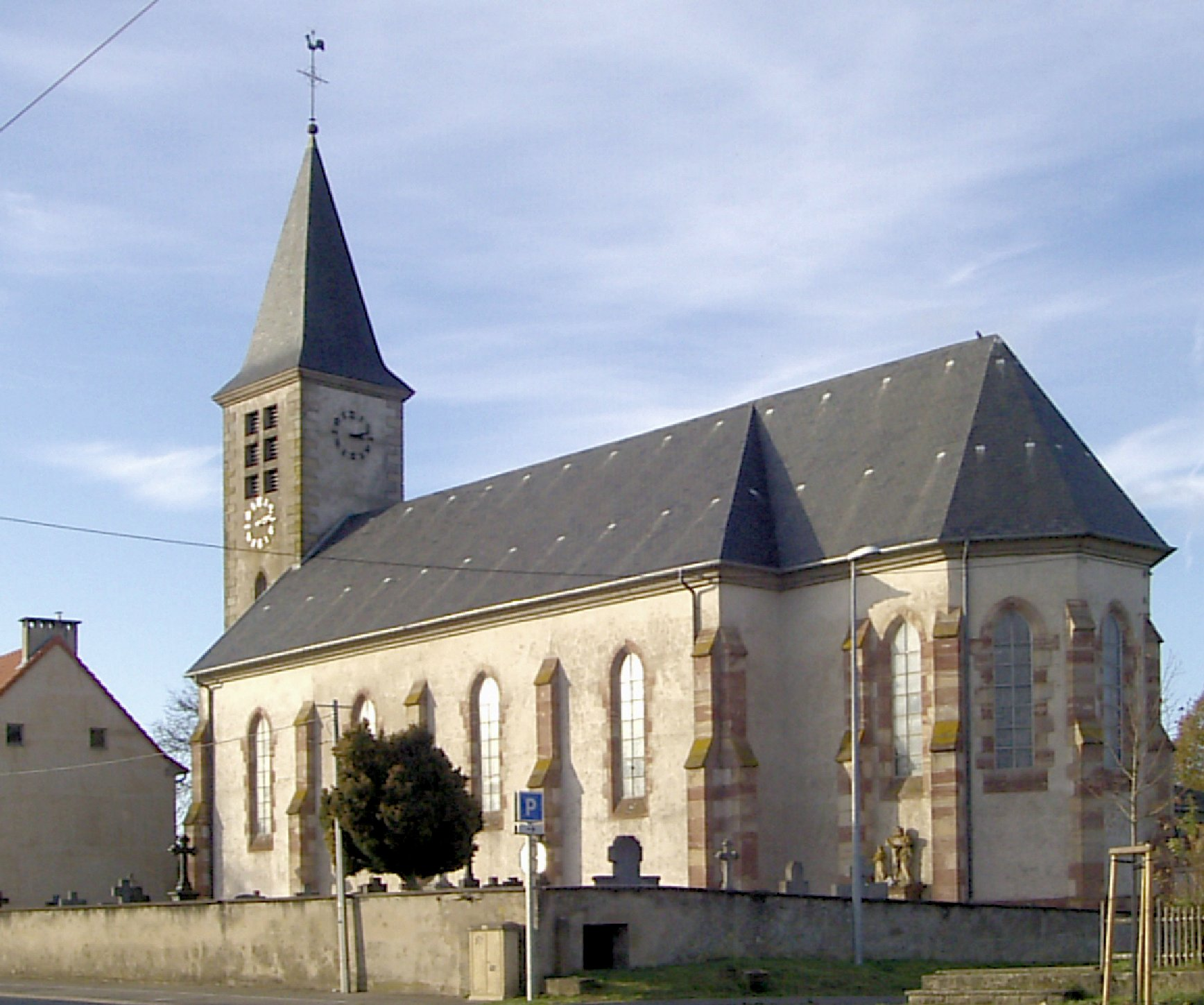 L'église Saint-Maurice à Hoste